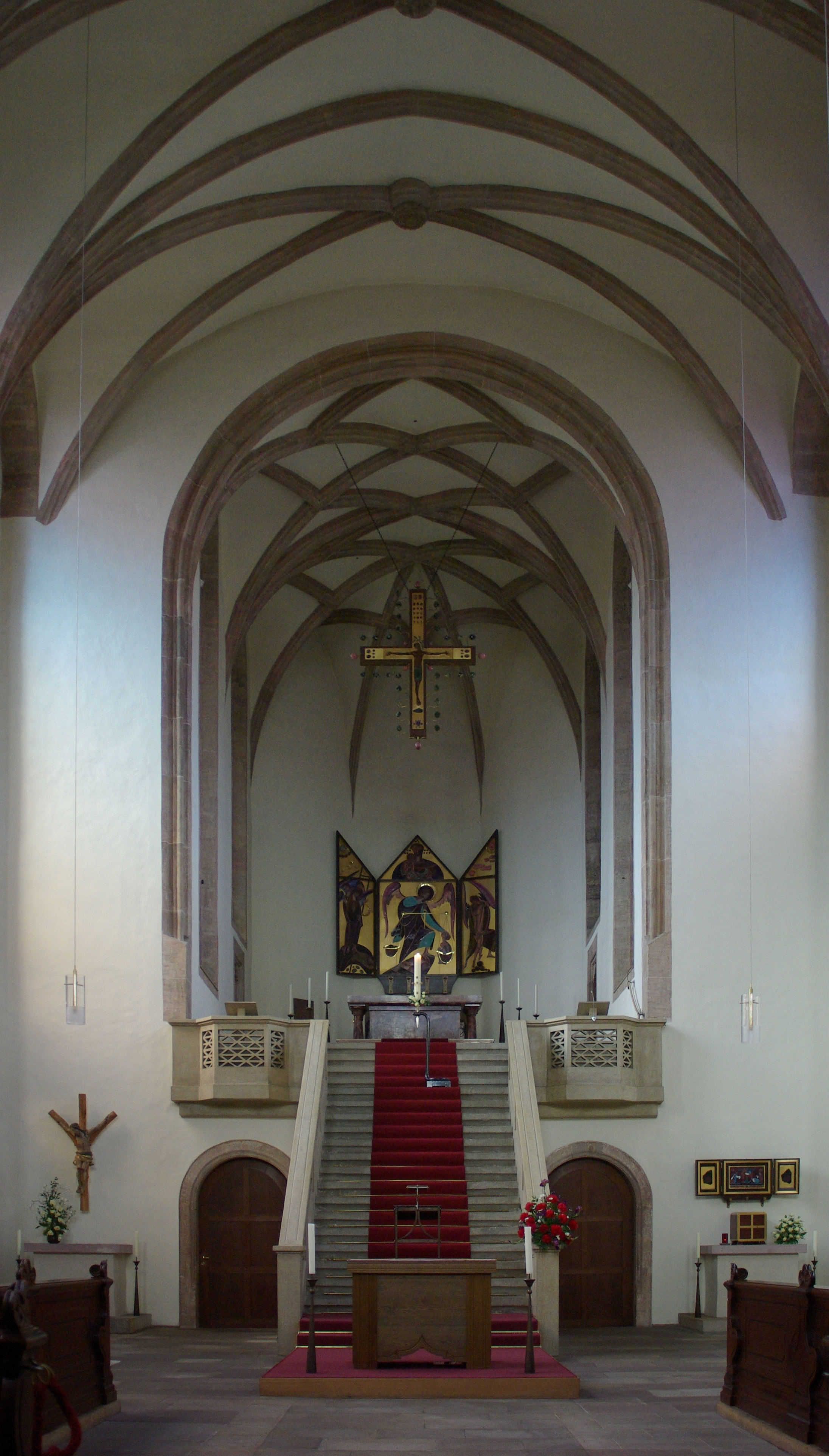 Altarraum der Benediktinereinnenabtei in Fulda